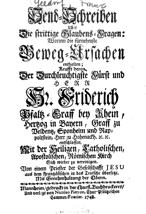 Buchtitelblatt von Pater Franz Joseph Seedorf S.J., kurpfälzischer Hofbeichtvater, 1748